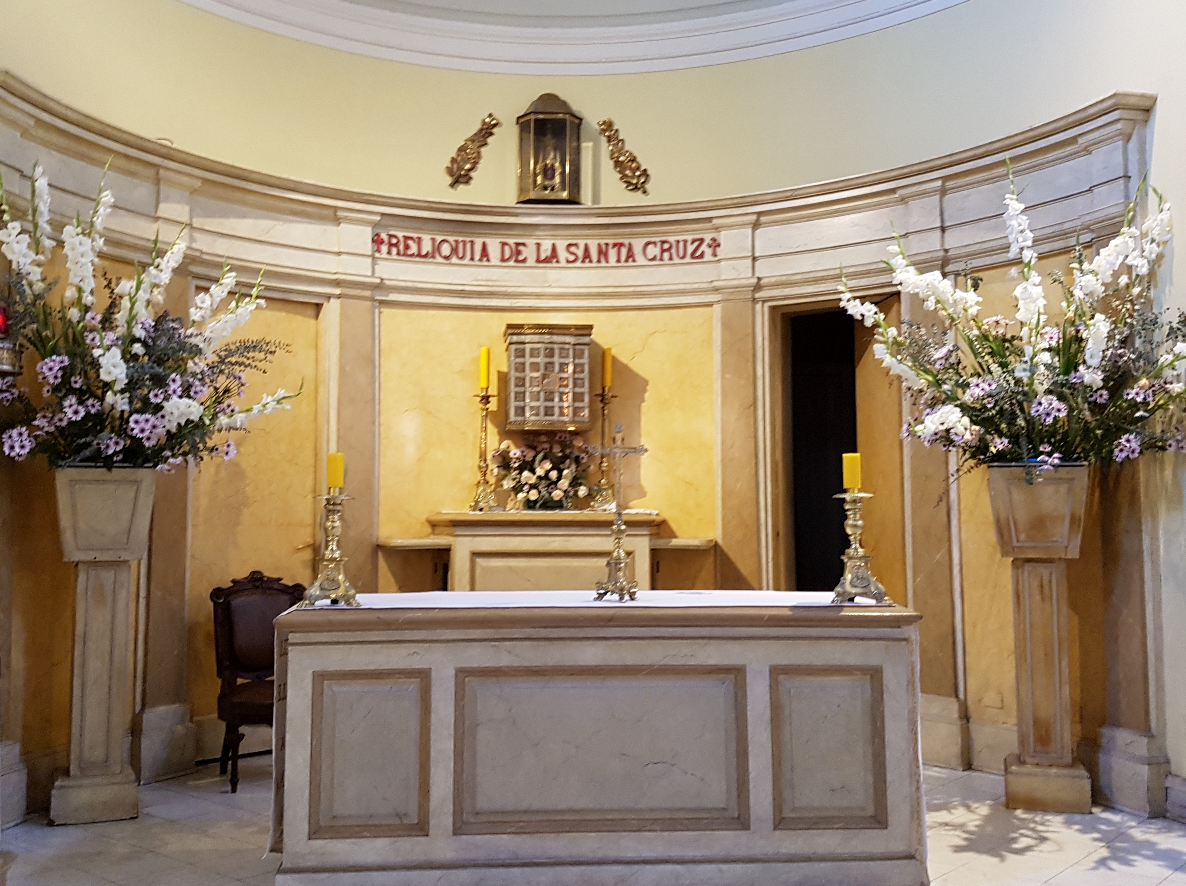 Altar de la Iglesia de la Veracruz, con la reliquia de la Santa Cruz. Calle Lastarria nº. 124. Barrio Lastarria, Santiago de Chile.